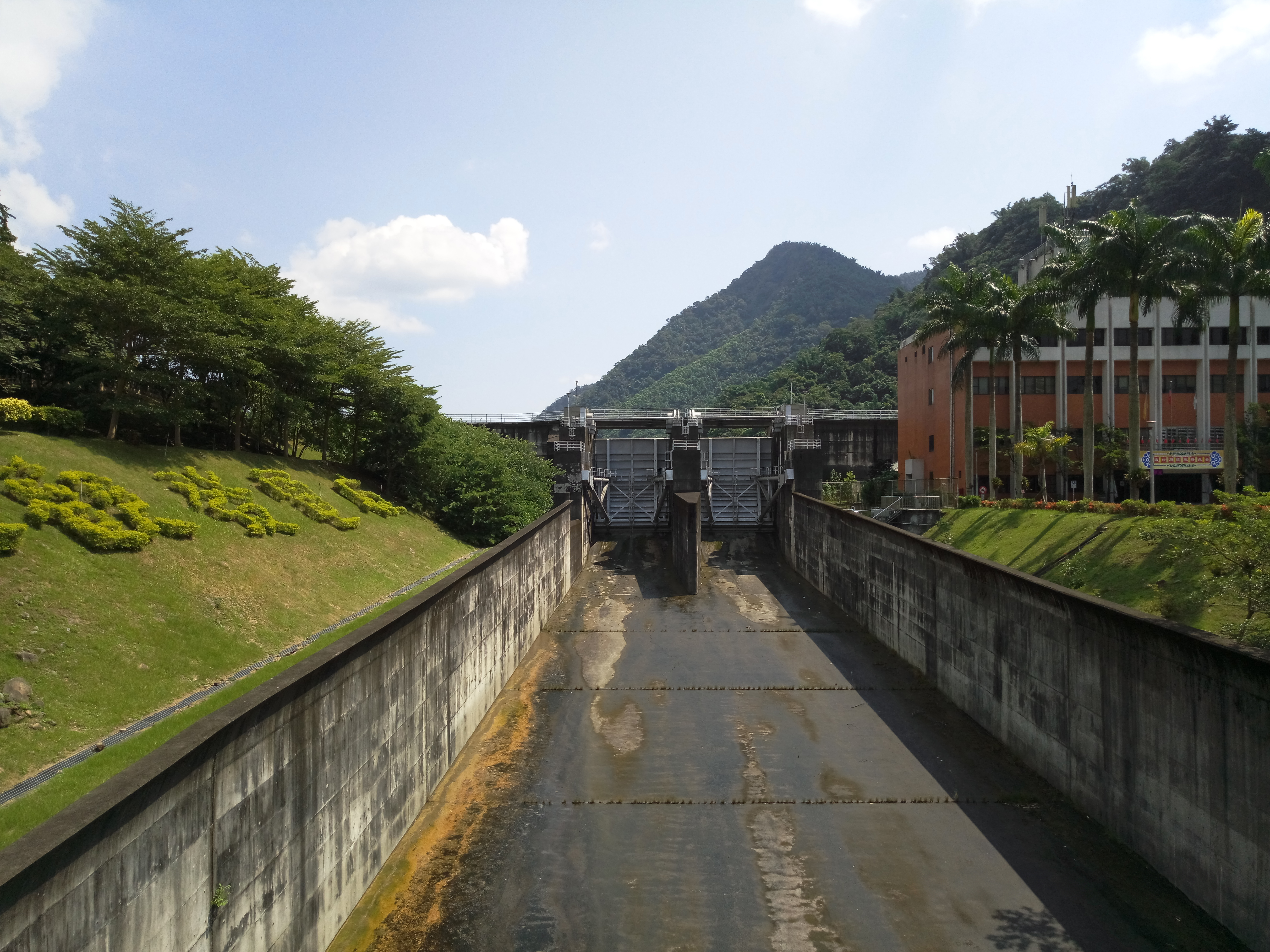 台灣電力公司 大觀發電廠 明湖壩洩洪道